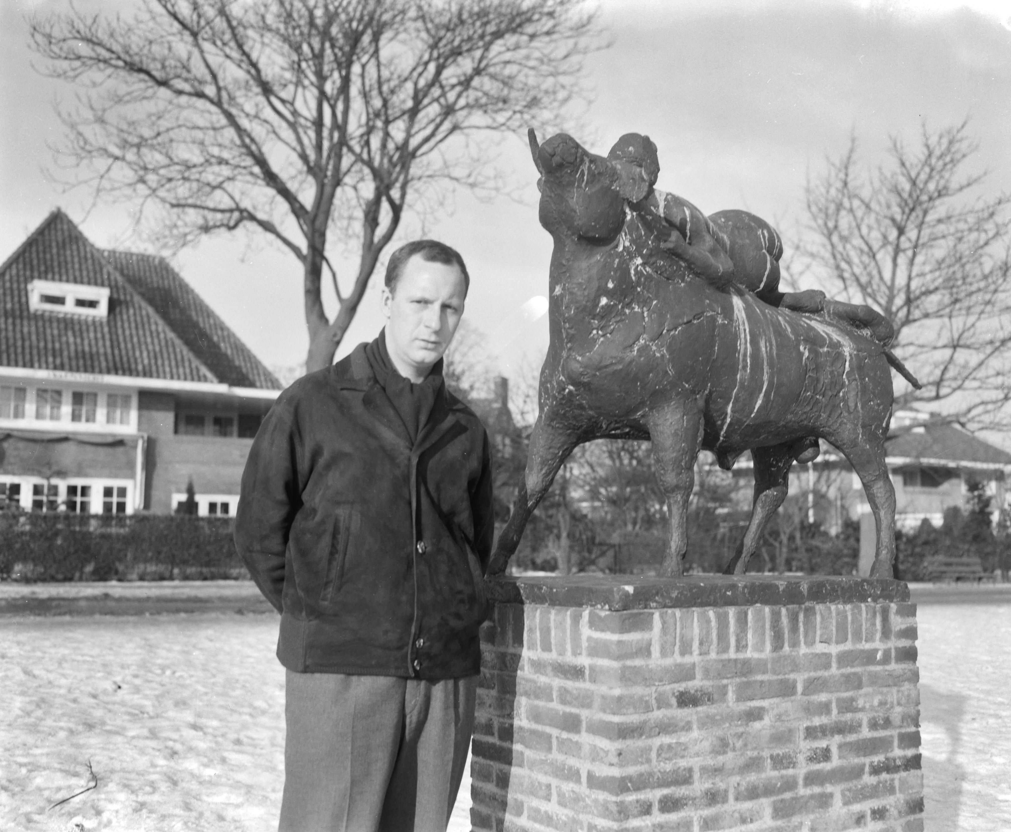 De beeldhouwer Ek van Zanten in 1963.